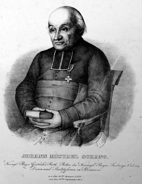 Pfarrer Johann Michael Schang, Pirmasens, Pfalz